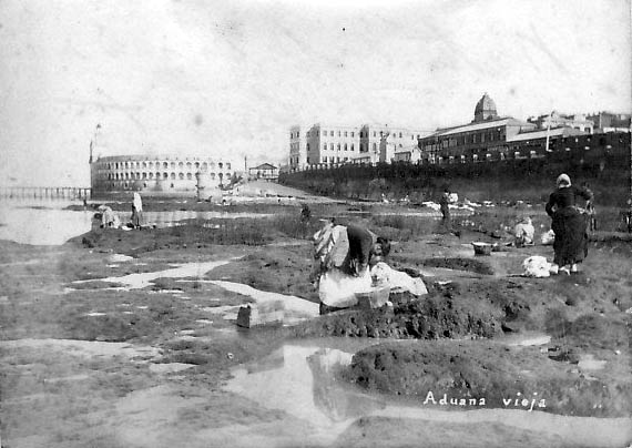 Vista de la ribera de Buenos Aires con mujeres lavando la ropa en pozos hechos en la tosca del Río de la Plata. Puerto Madero no existía, al fondo se ven la Casa Rosada recién construida y la Aduana de Taylor, y sobre la derecha aparece el murallón que contenía a la actual Avenida Leandro N. Alem.